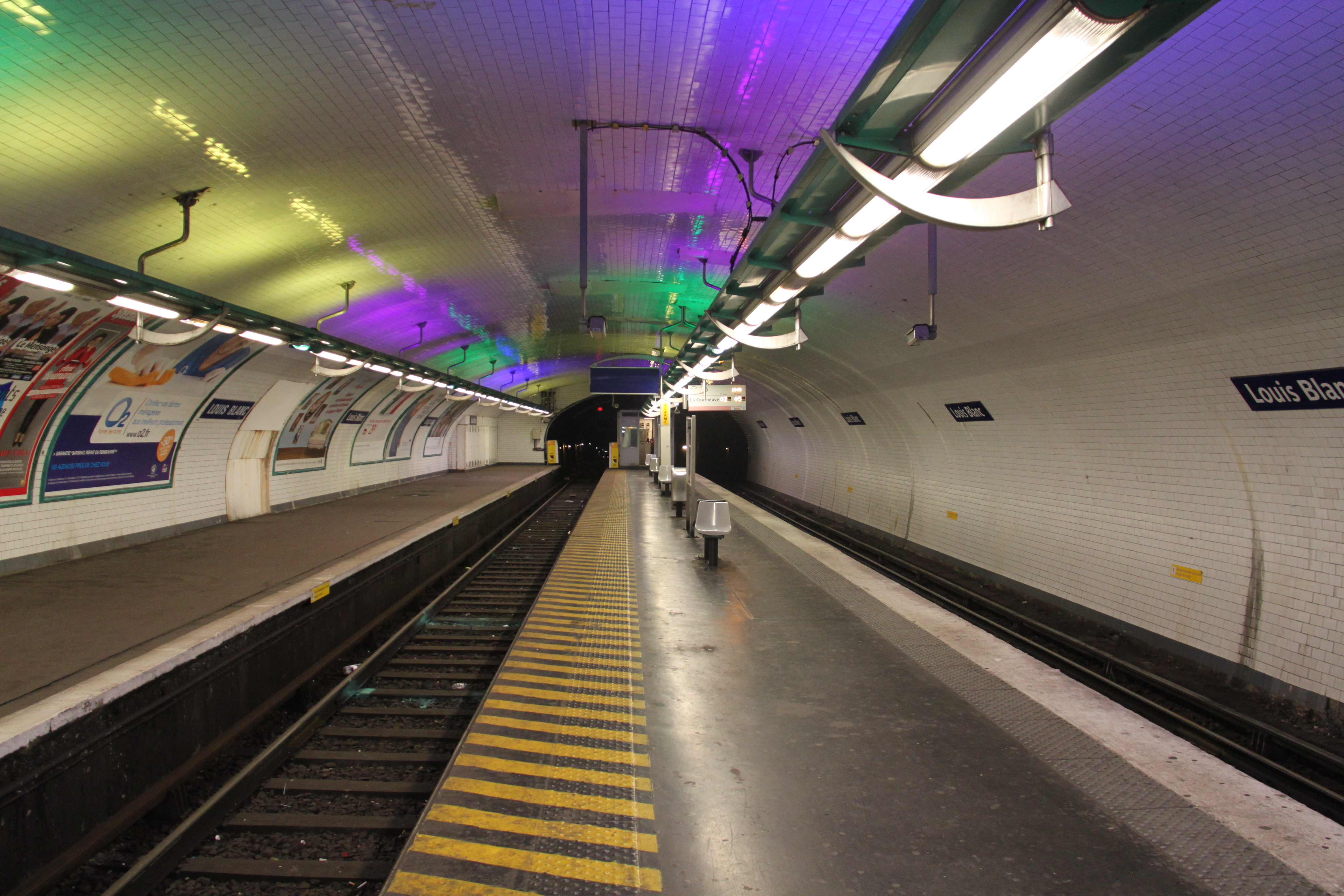 Louis Blanc metro station